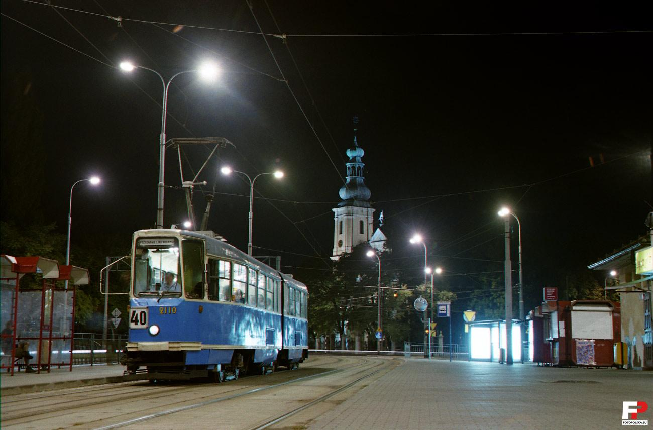 Konstal 102N na placu Wróblewskiego.